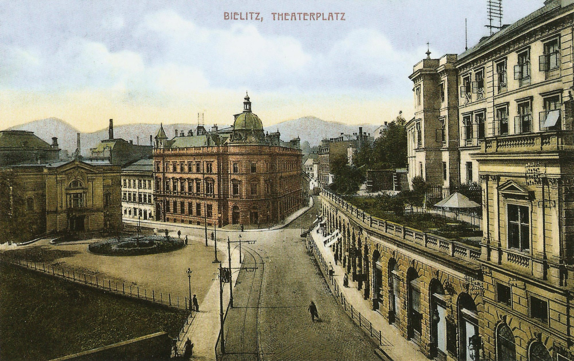 „Plac Teatralny“ w Bielsku-Białej. Teatr, Poczta Główna, Bazary Zamkowe, Zamek